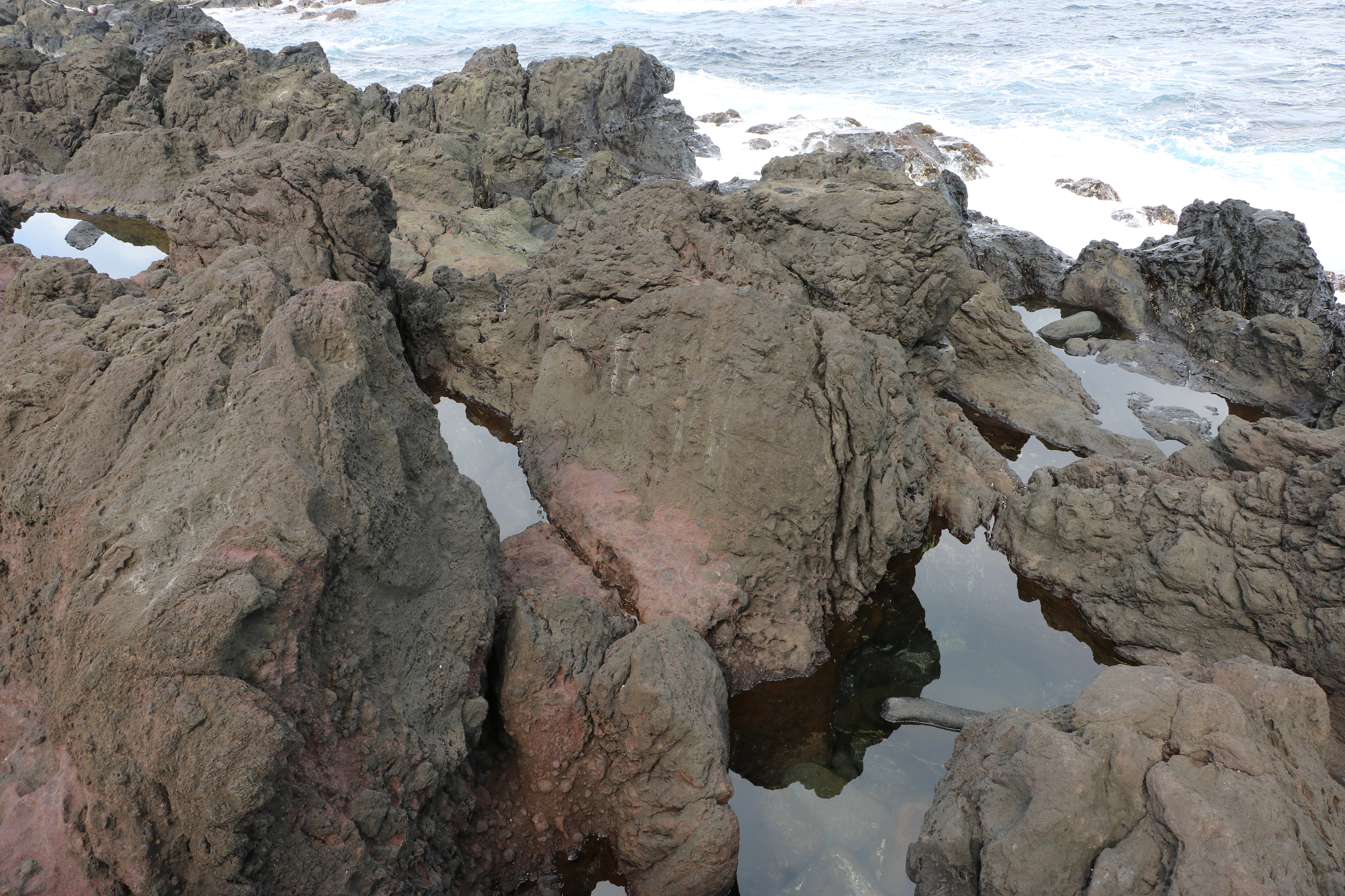 八丈小島鳥打地区海岸沿いの熔岩地帯（東京都八丈町）